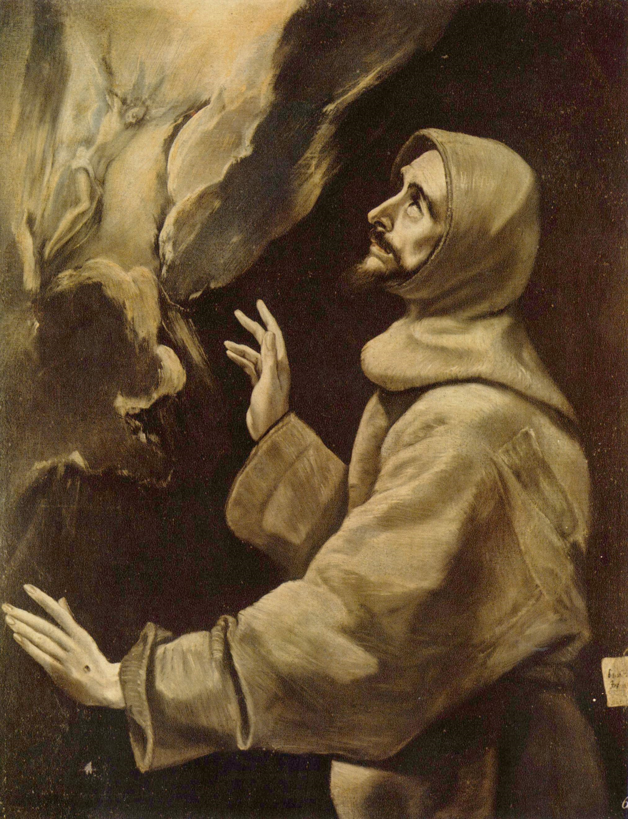 La obra representa a San Francisco de Asís, fundador de la Orden de los franciscanos, recibiendo los estigmas.